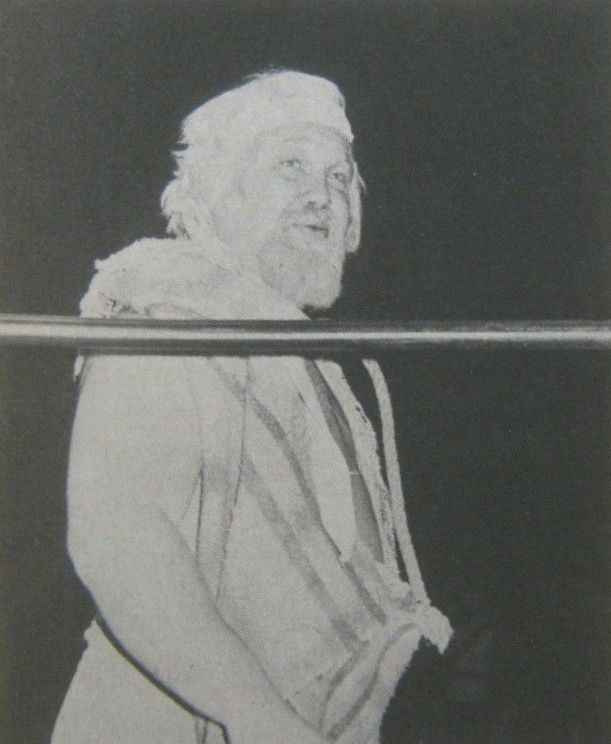 Moondog Mayne dans le magazine de catche Wrestling Annual de juin 1945.